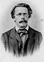 Bild des deutschen Mathematikers/Photograph of the German mathematician Ludwig Otto Hesse